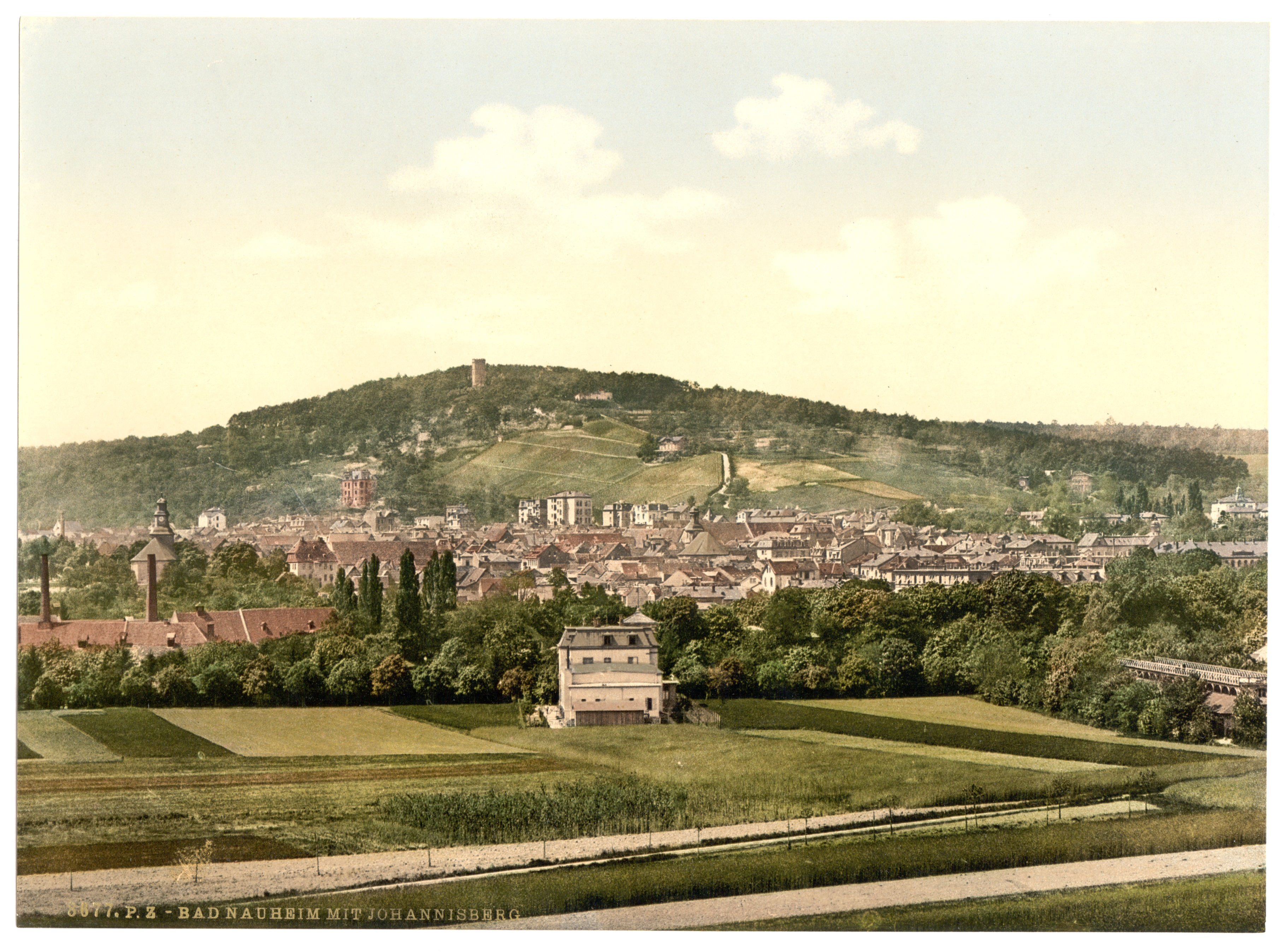 Bad Nauheim mit Johannisberg um 1900